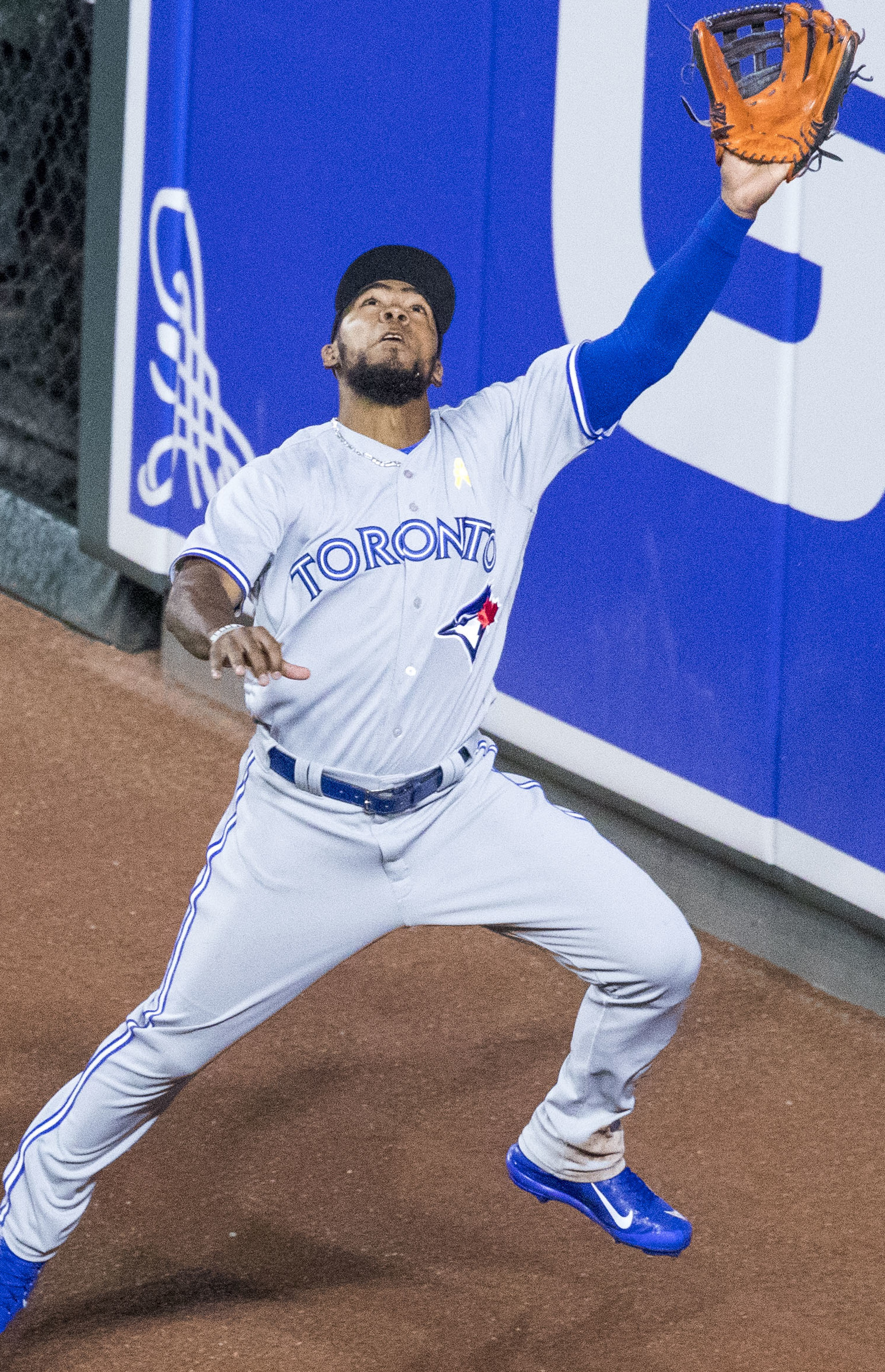 Blue Jays at Orioles 9/1/17